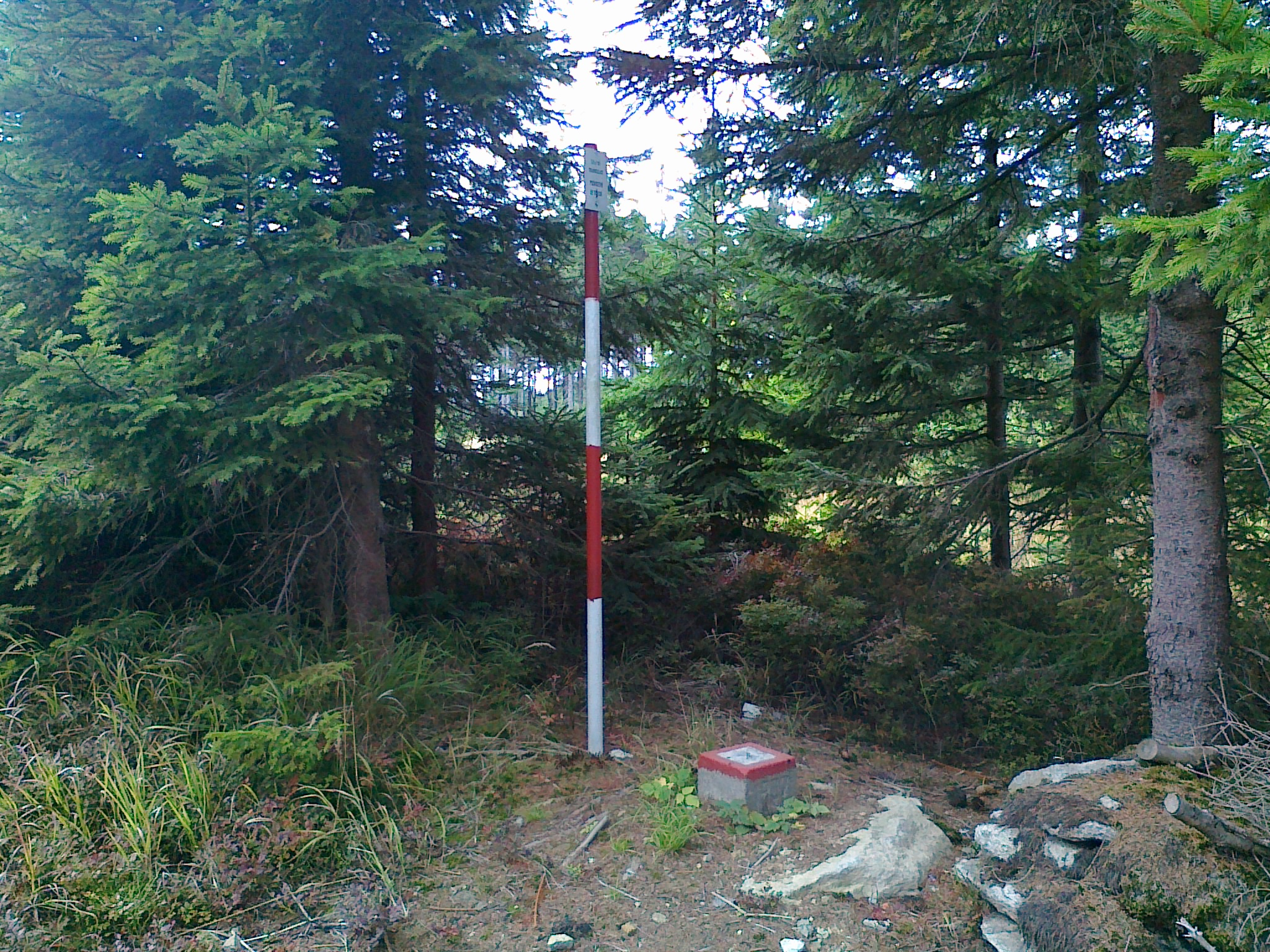 Punkt geodezyjny na szczycie góry Ucháč - 1009 m n.p.m.